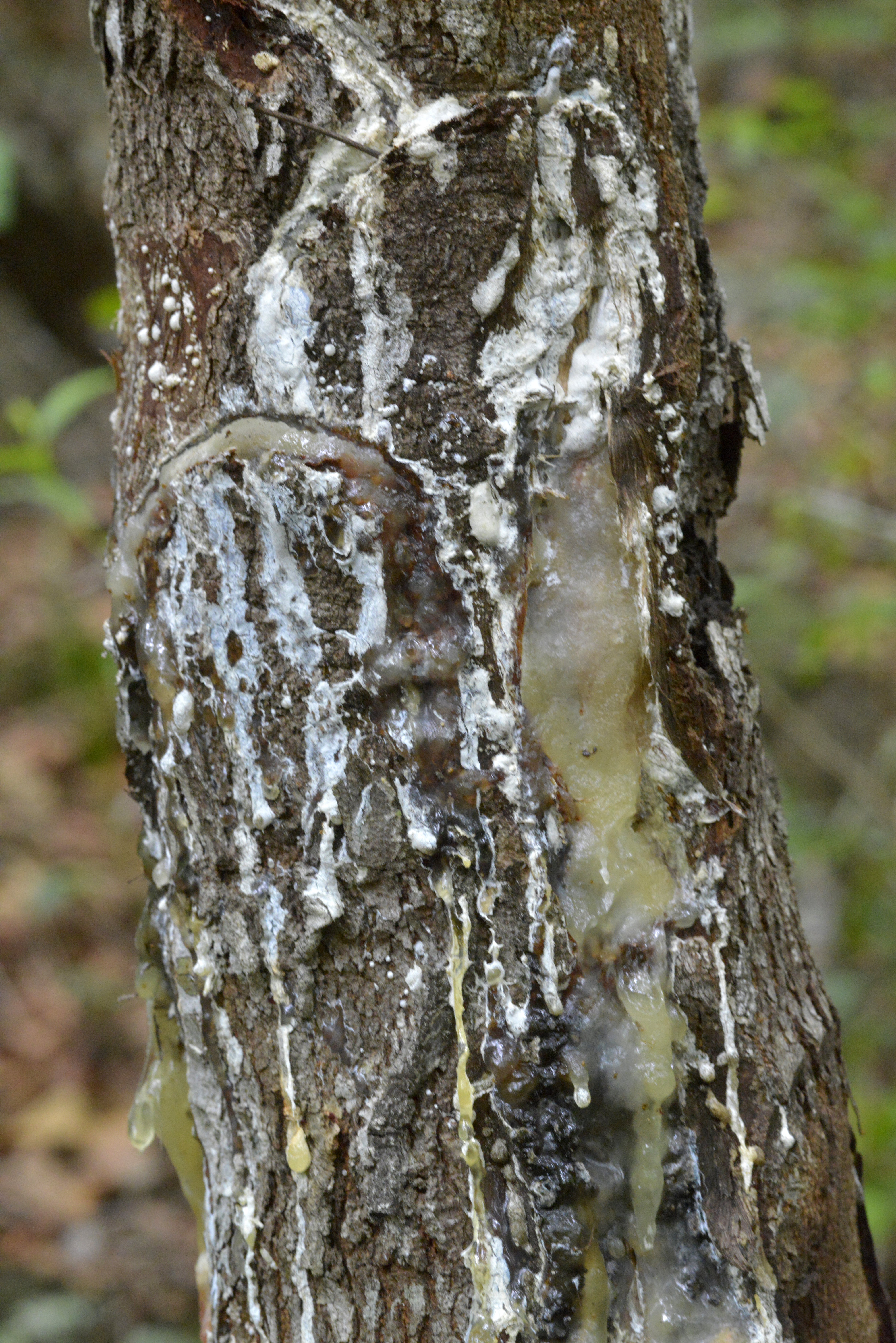 Resina da árvore almácega ou amescla, almecegueira, breu-branco-verdadeiro (Protium heptaphyllum)